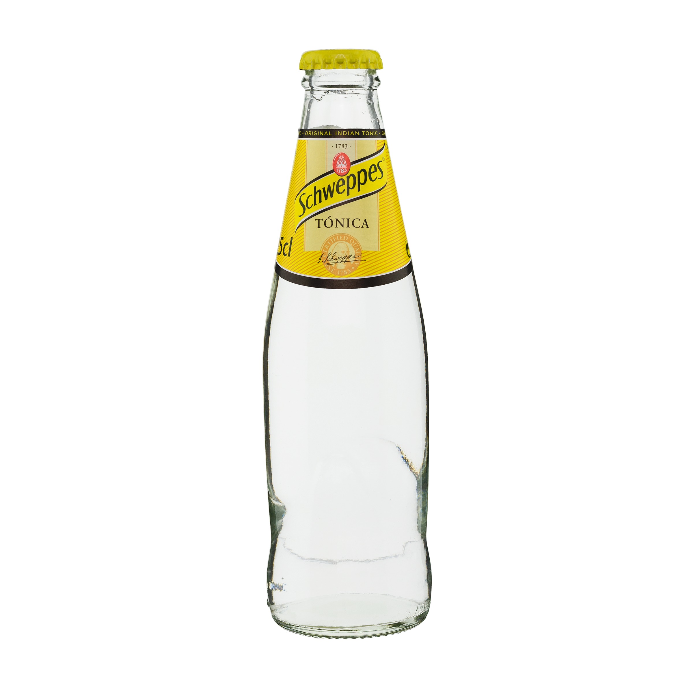 Tónica Schweppes fue la primera tónica en lanzarse al mercado en 1870.